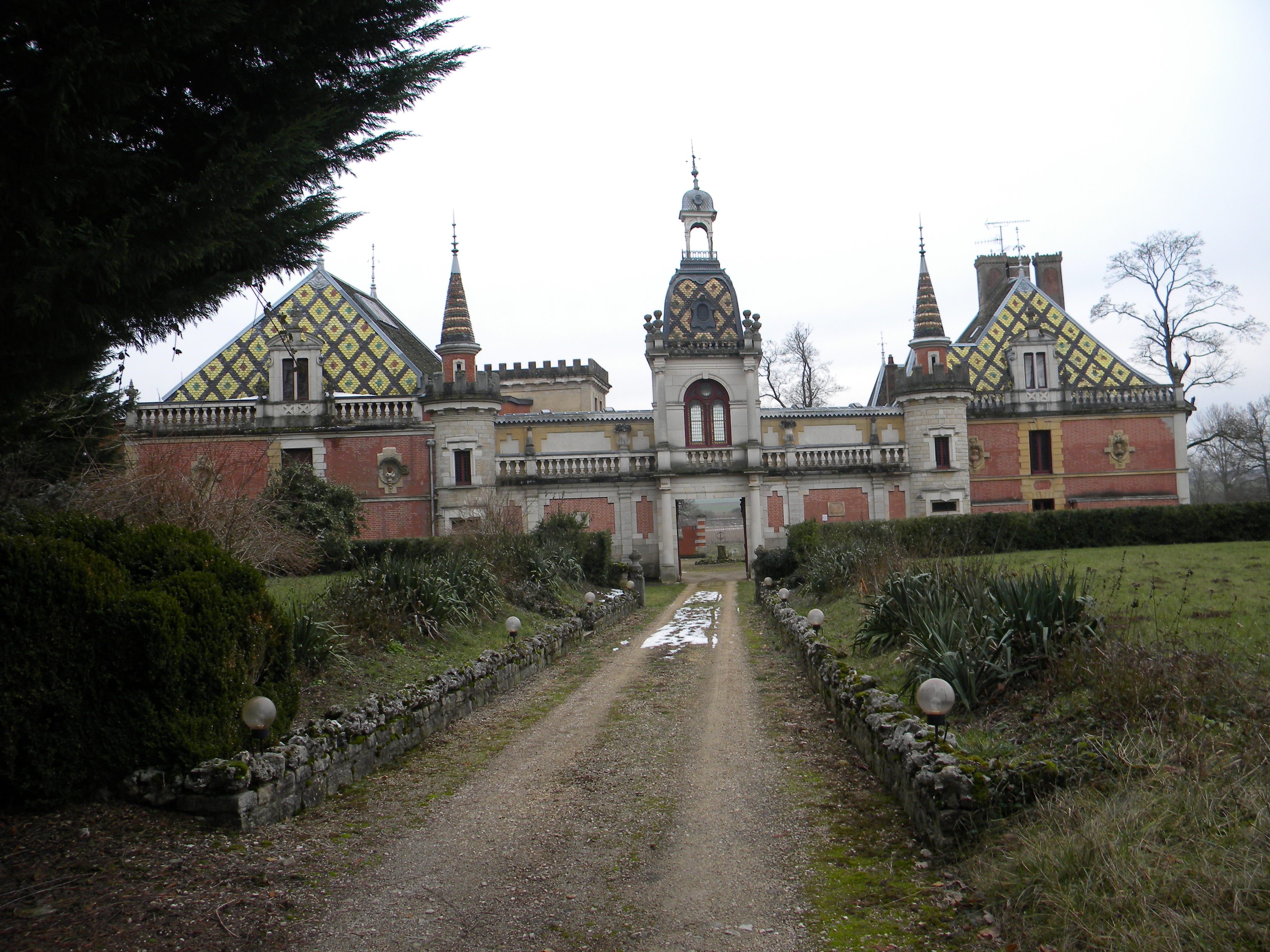 Kirko de Chevigny-en-Valières